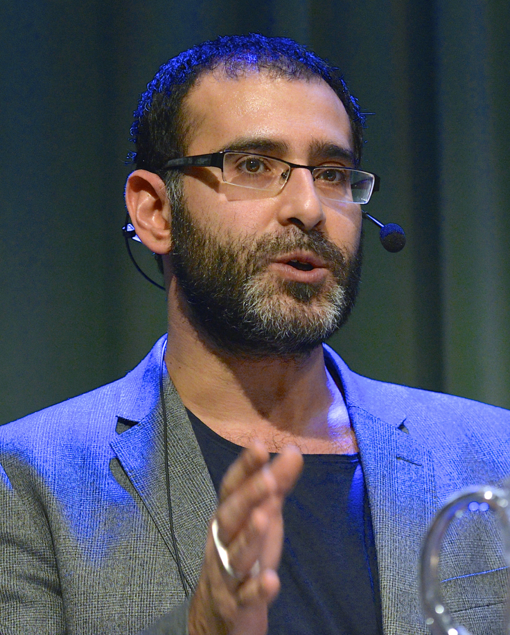 Behrang Kianzad i en debatt om flyktingmottagande och migrationspolitik på Kulturhuset Stadsteatern den 10 december 2014.